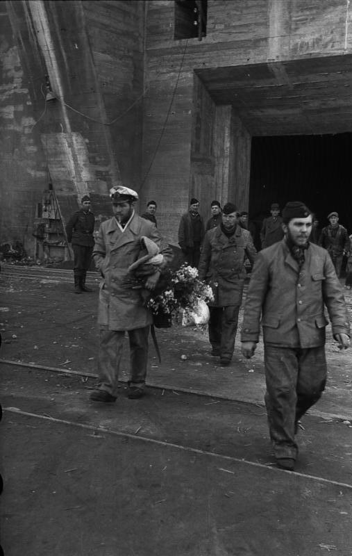 Positiv: "St. Nazaire", März 1942, U 96, Kptlt. Lehmann-Willenbrock